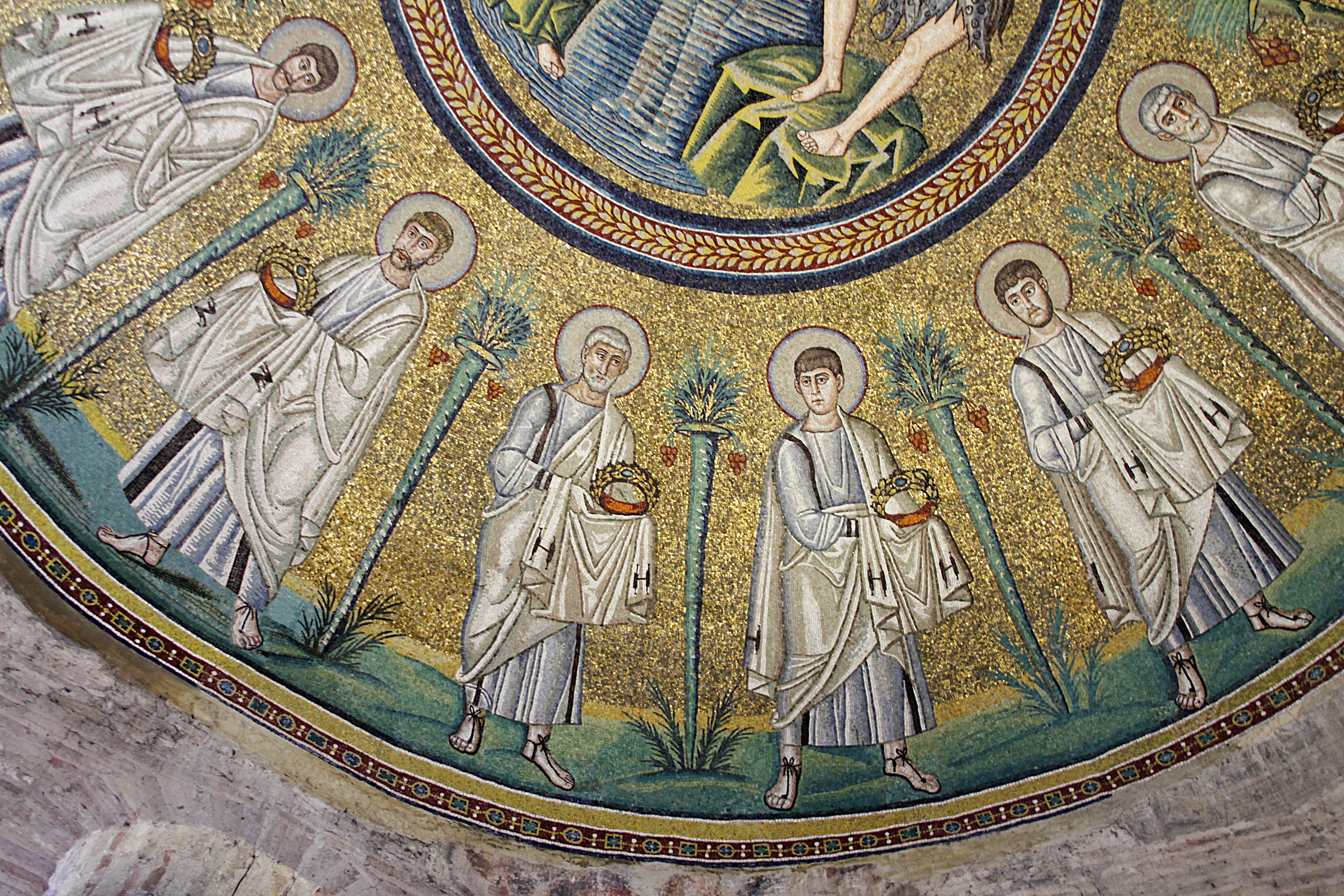 Arian Baptistry - Ravenna